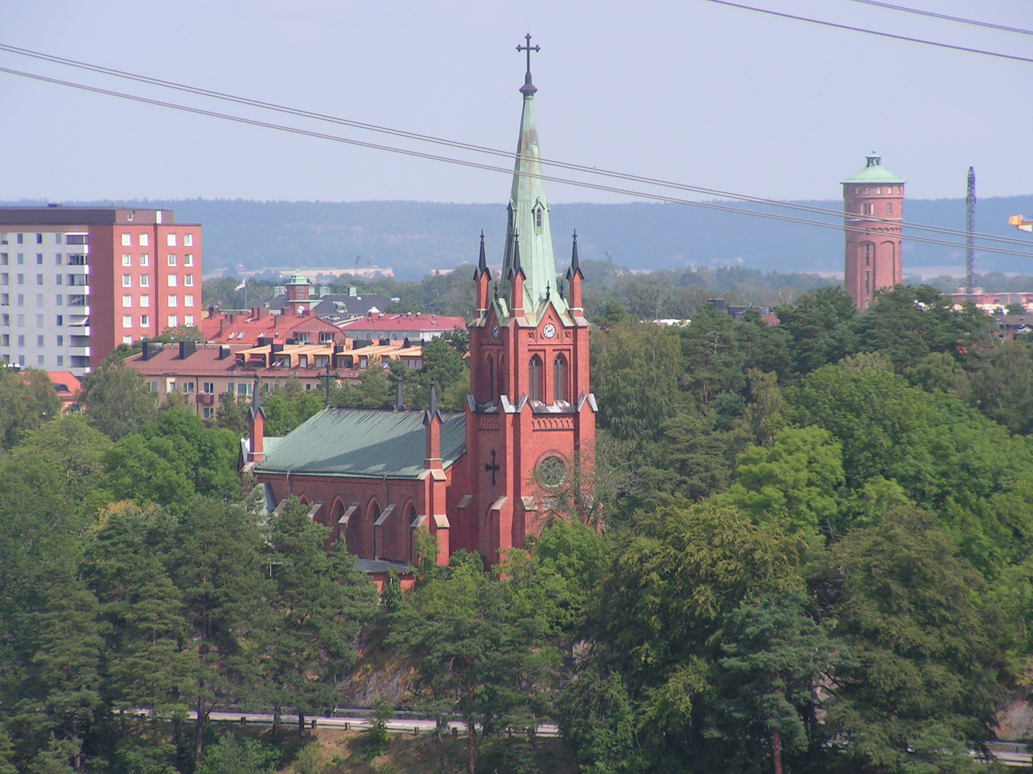 Trollhättans kyrka